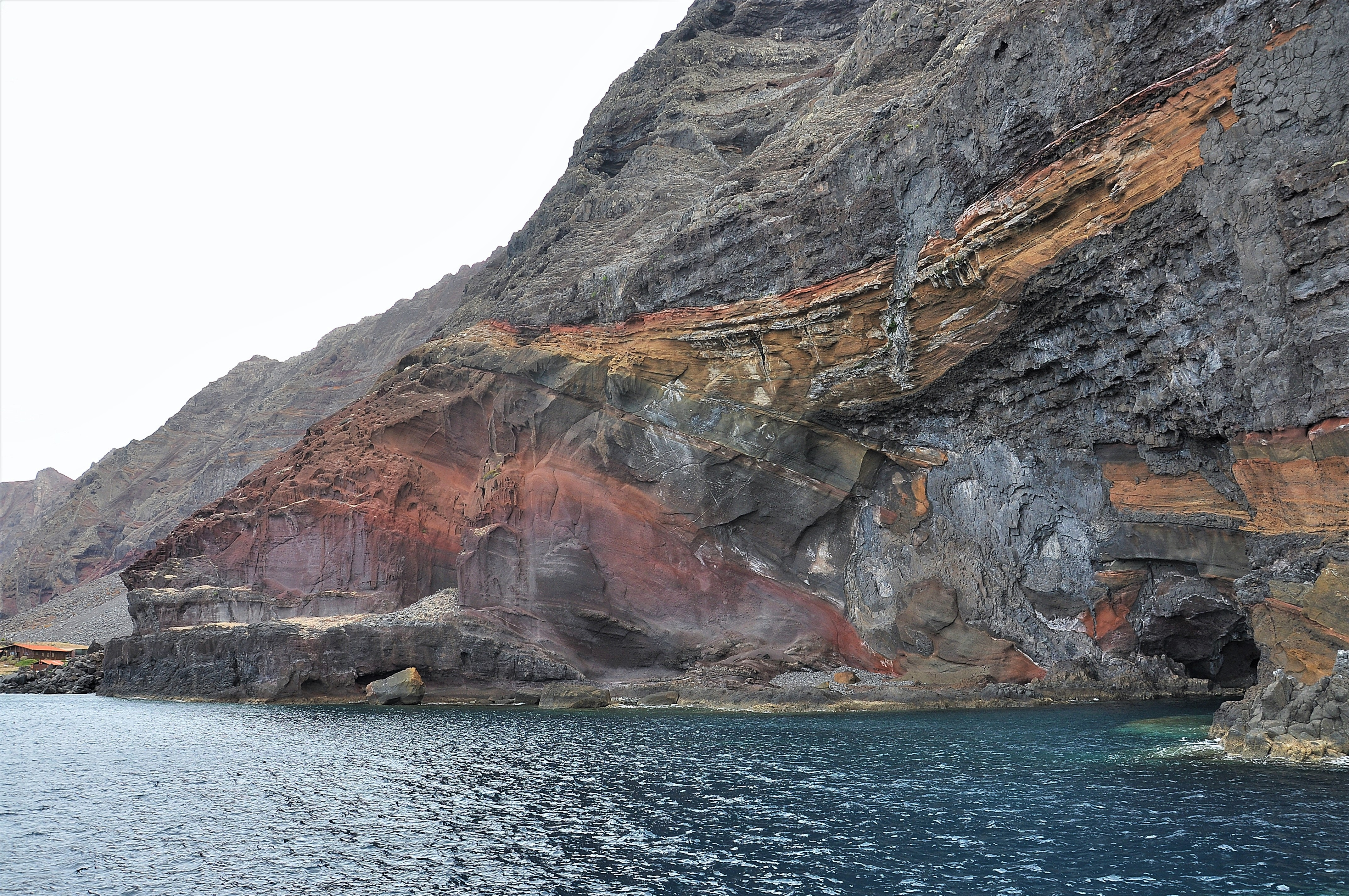 Madeira 2019